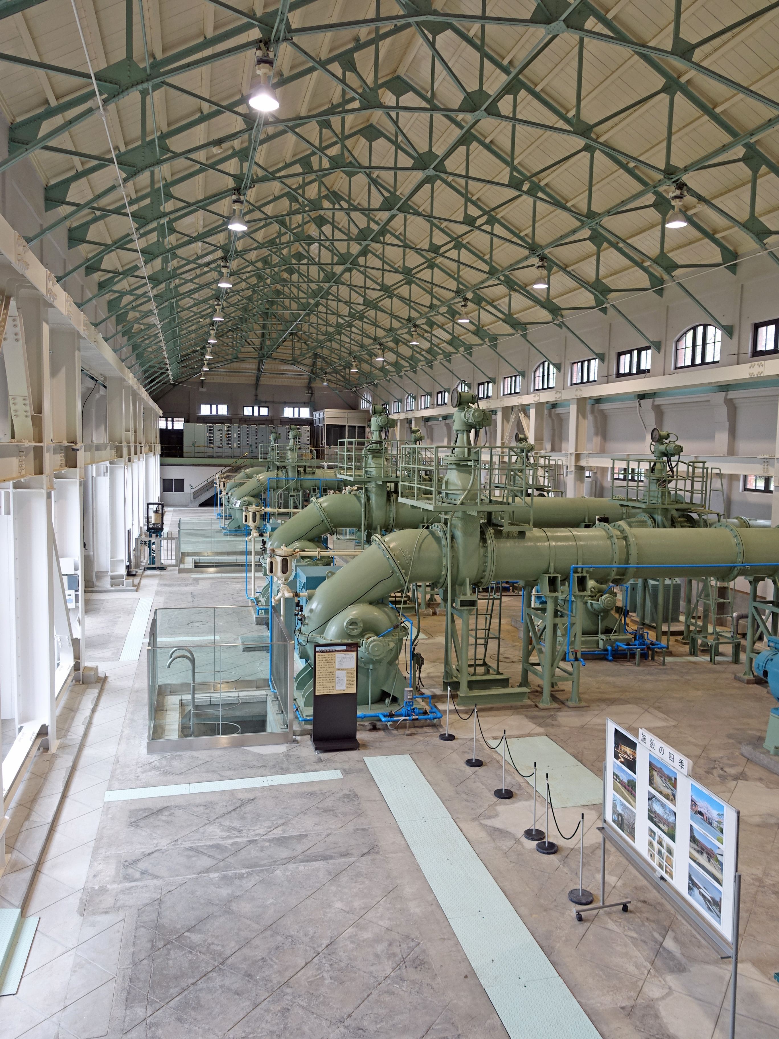 旧三河島汚水処分場喞筒場施設（2007年日本の重要文化財に指定）建屋。